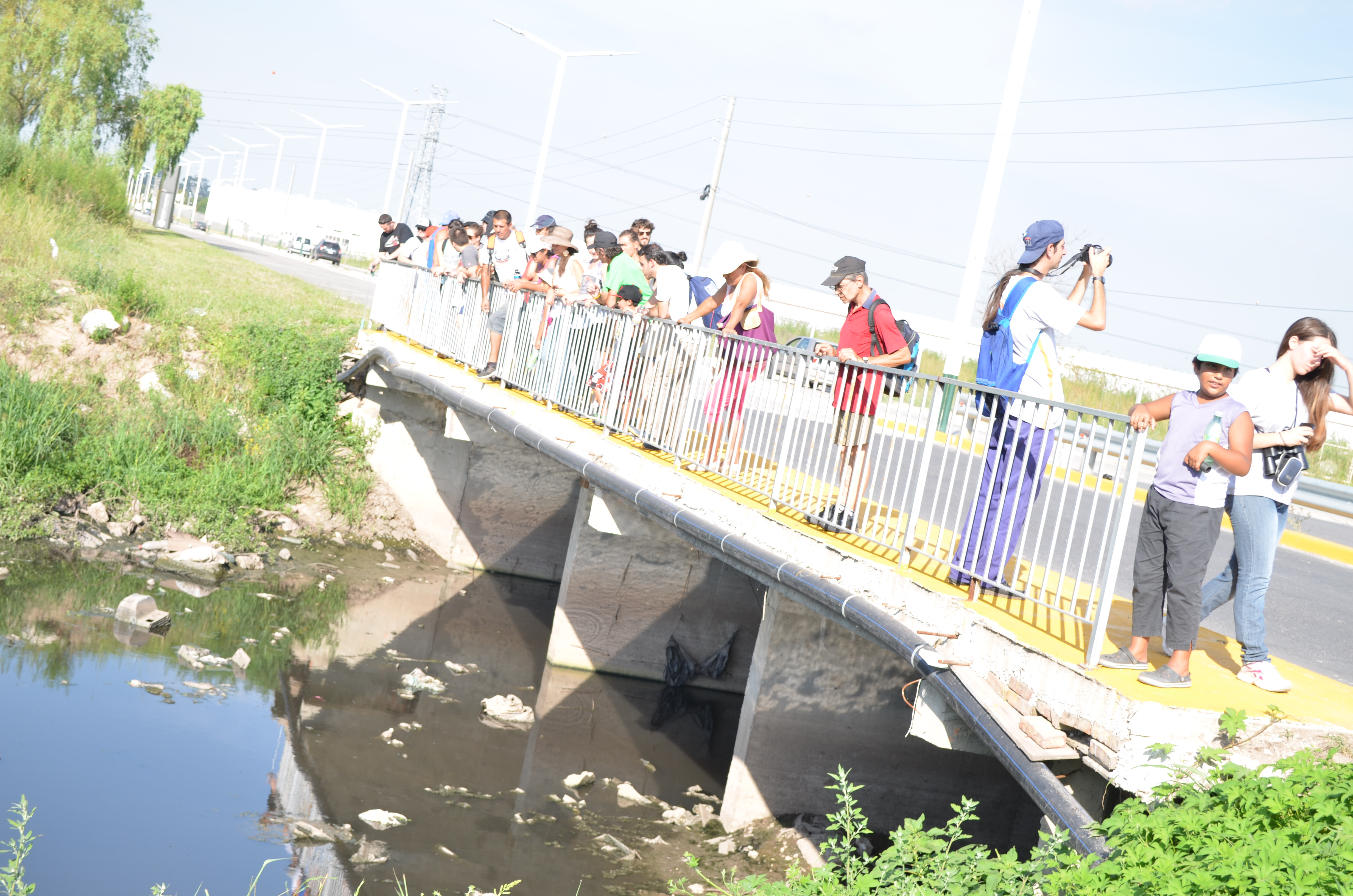 Arroyo Ortega, Esteban Echeverría